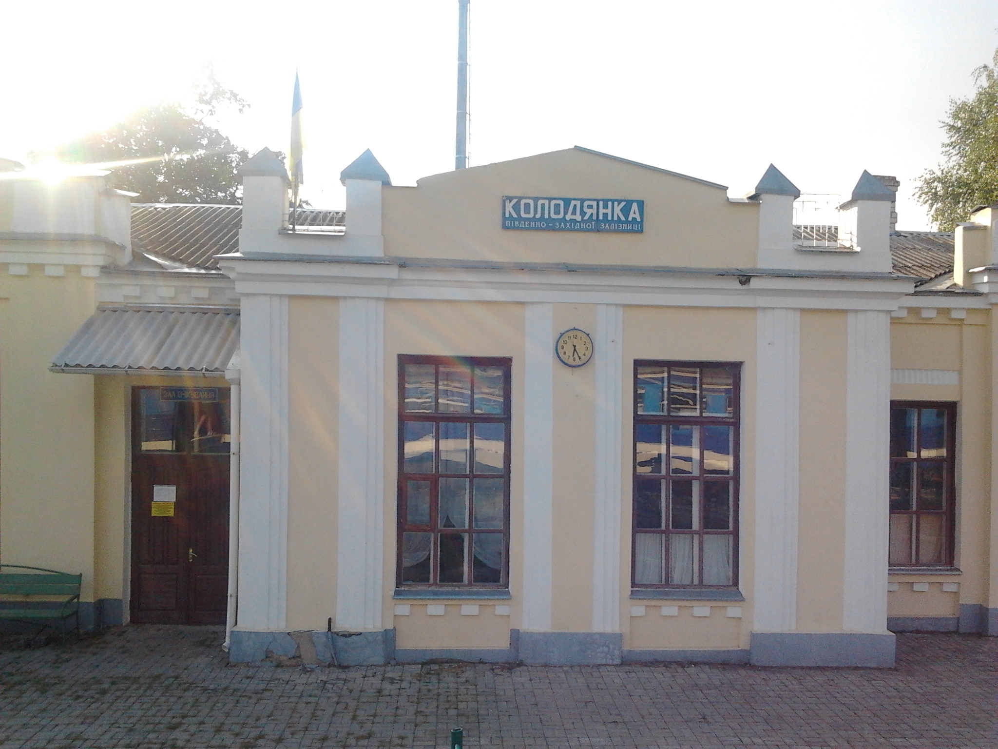 Железнодорожная станция Колоденка